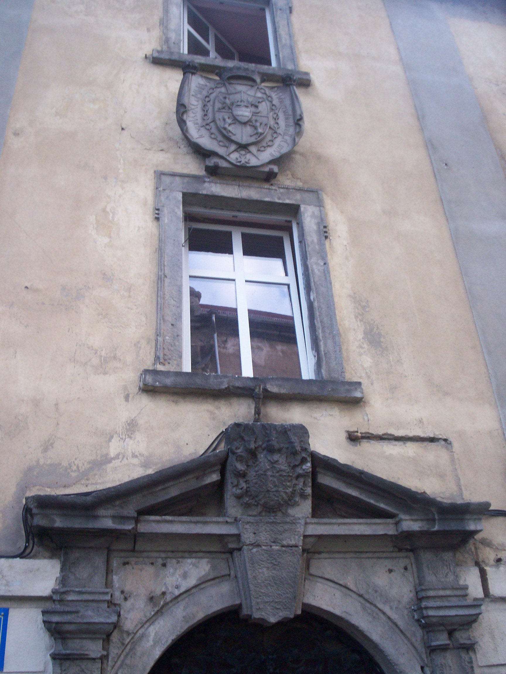 Komandoria Joanitów. Kartusze herbowe.